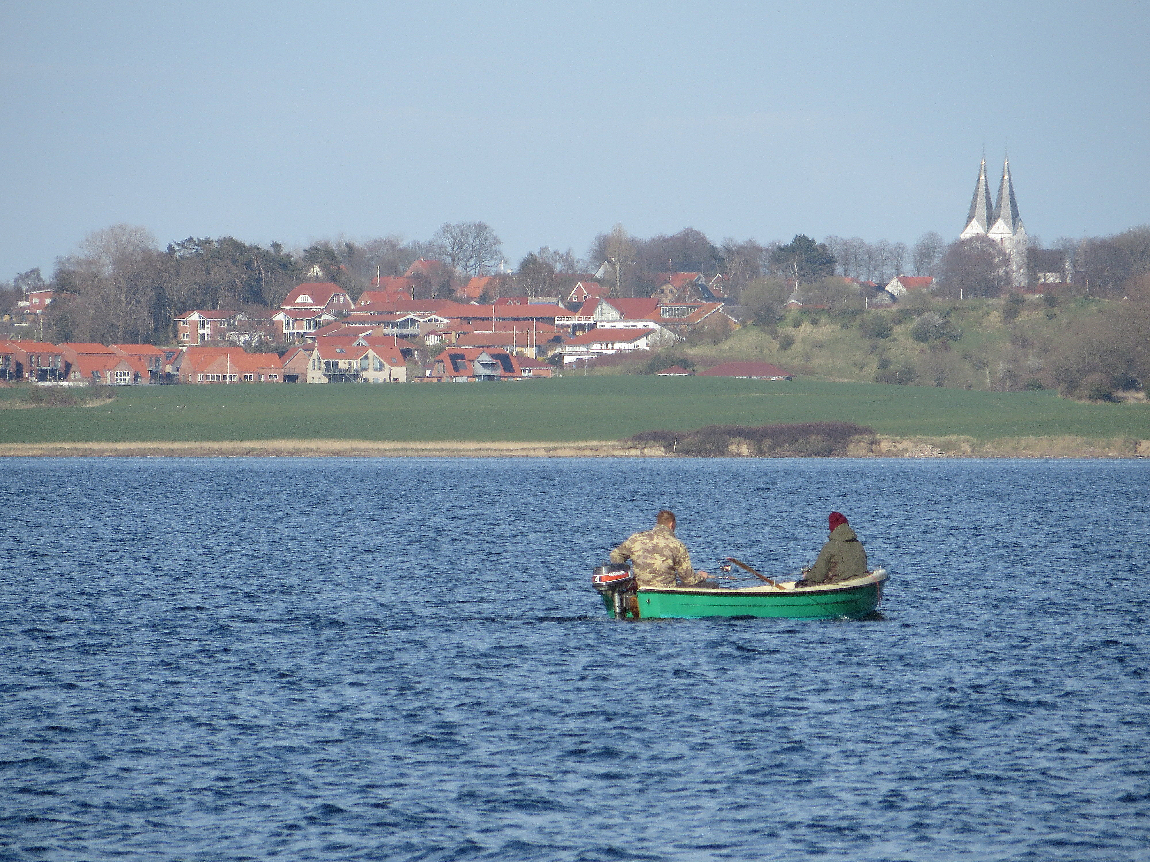 Broacker mit Kirche von Holnis aus (2015-04-19), Bild 08